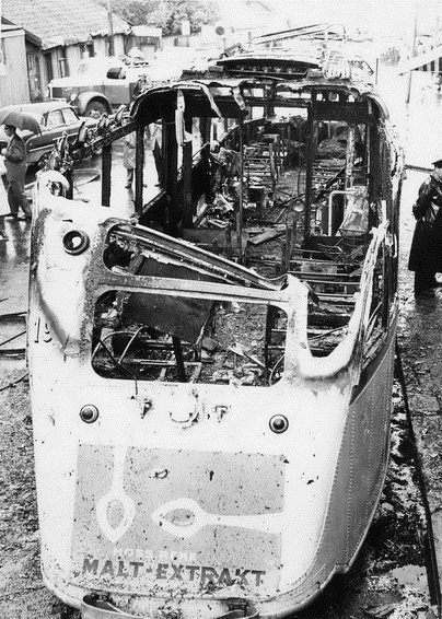 Trikkebrannen i Strømsveien, Oslo 2. august 1958. 5 mennesker omkom.